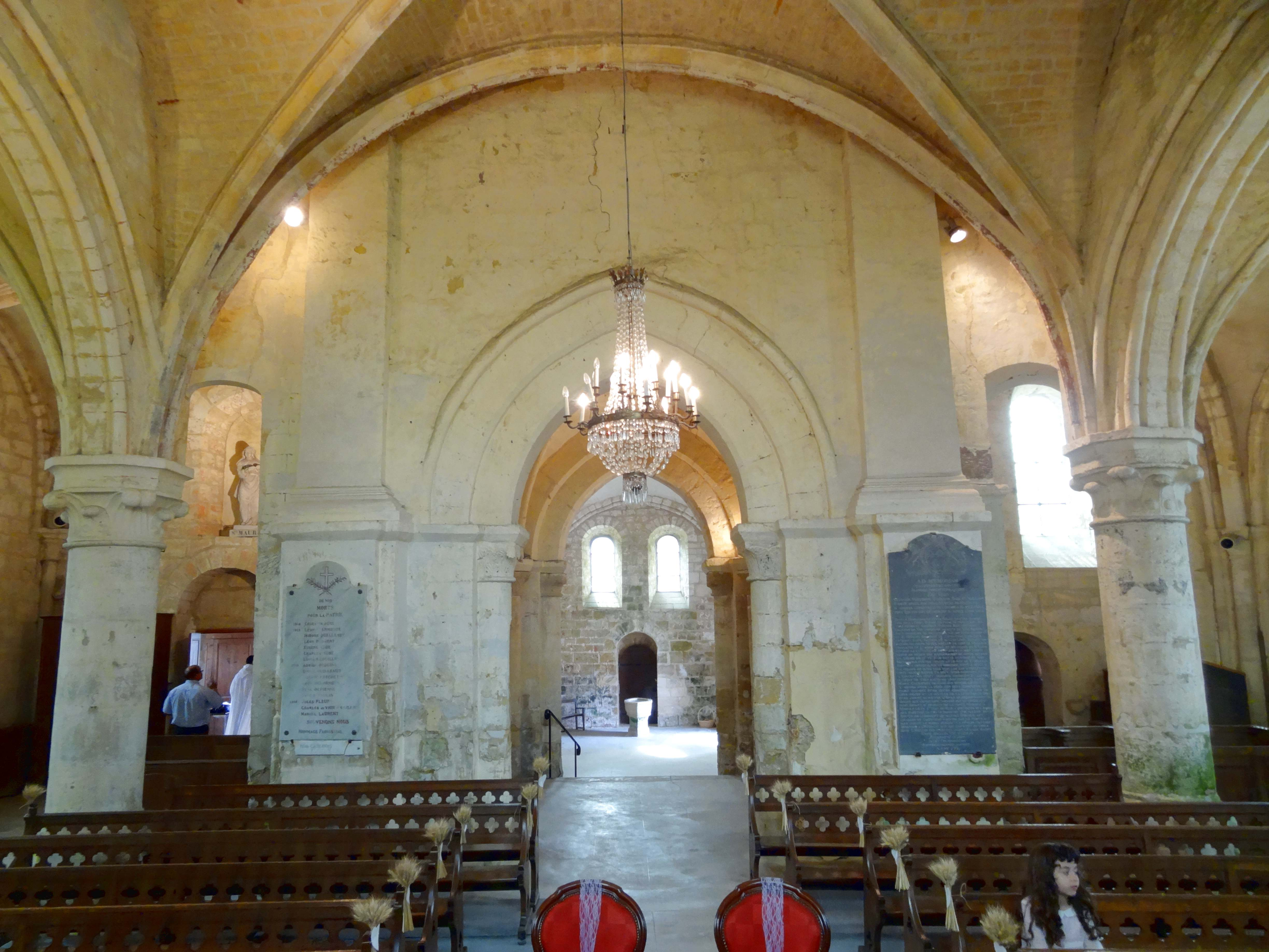 Intérieur de l'église - voir titre.